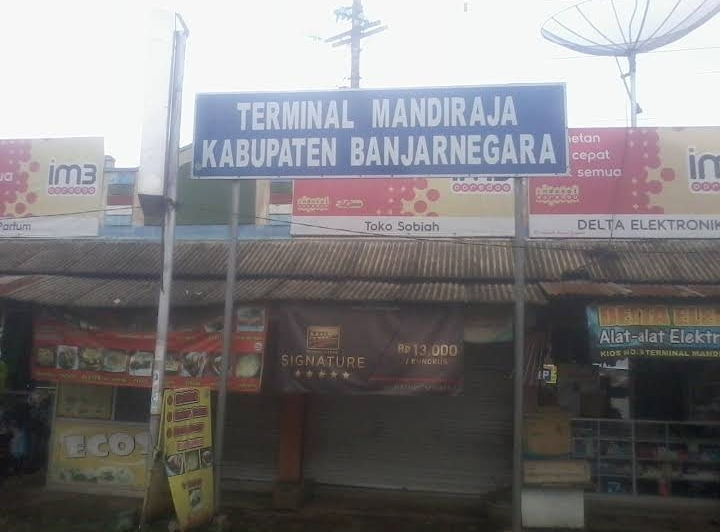 terminal mandiraja